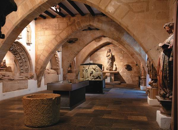 Museo catedralicio de León.